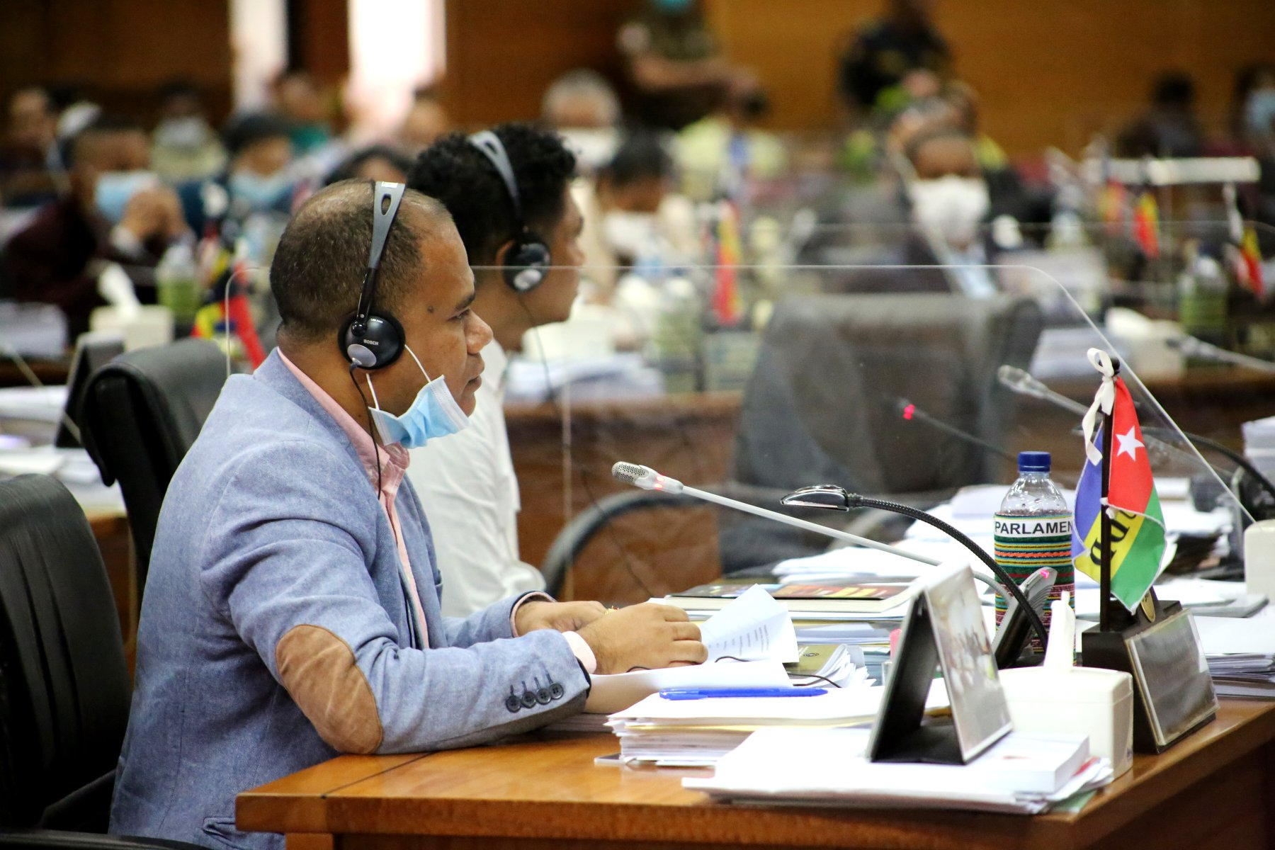 António de Sá Benevides in der Sitzung zur Verlängerung des Ausnahmezustandes im Nationalparlament Osttimors